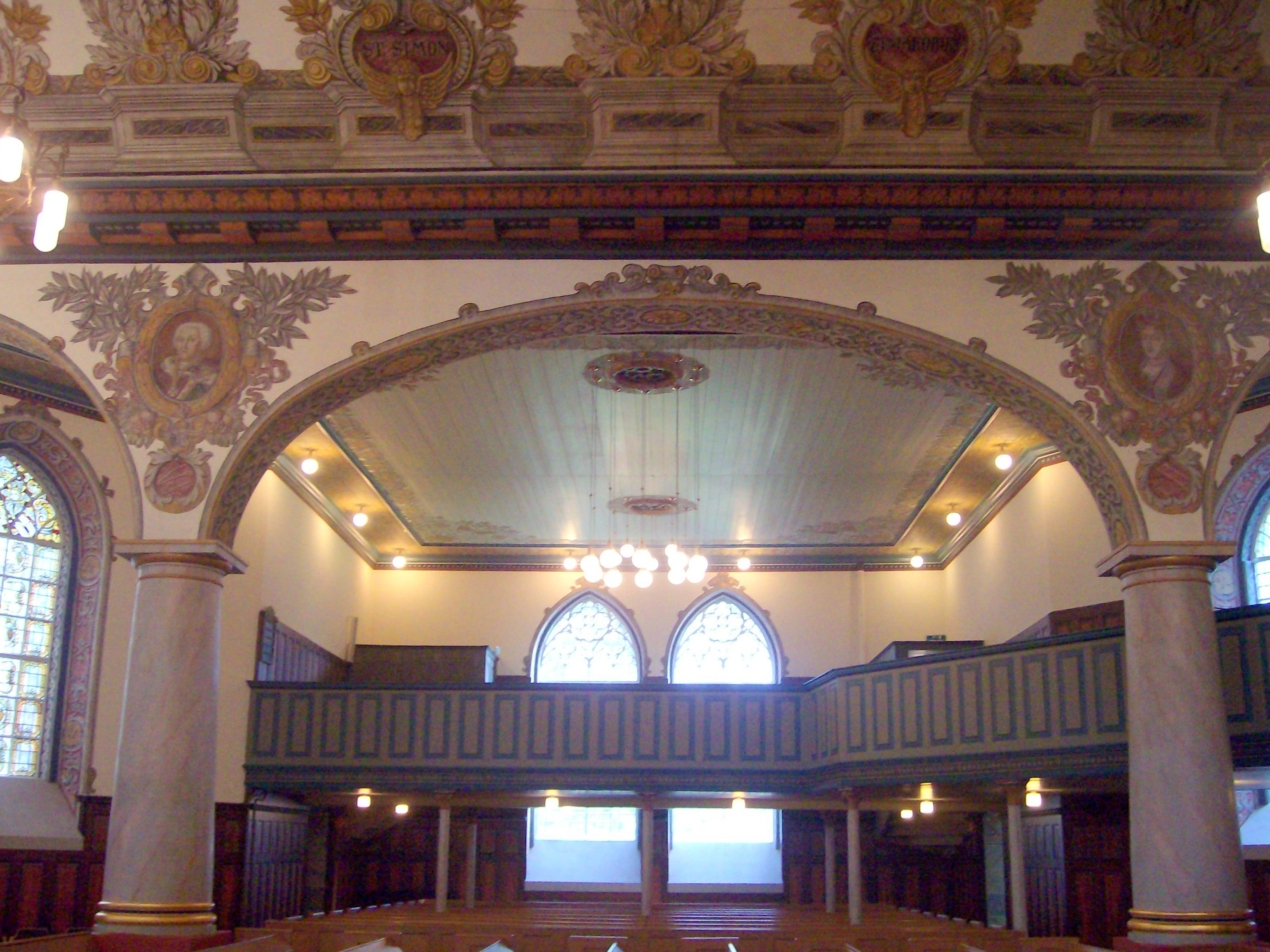 Südflügel der Lutherkirche in Leer, Ostfriesland